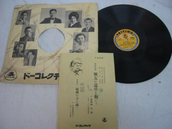 テイチクレコード「戦友の遺骨を抱いて」